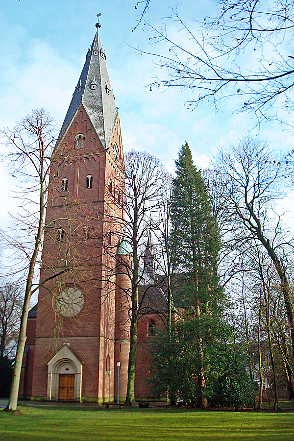 Katholische St.-Pankratius-Kirche zu Gütersloh This is the photograph of an architectural monument. It is part of the list of cultural monuments of Gütersloh, no. A132